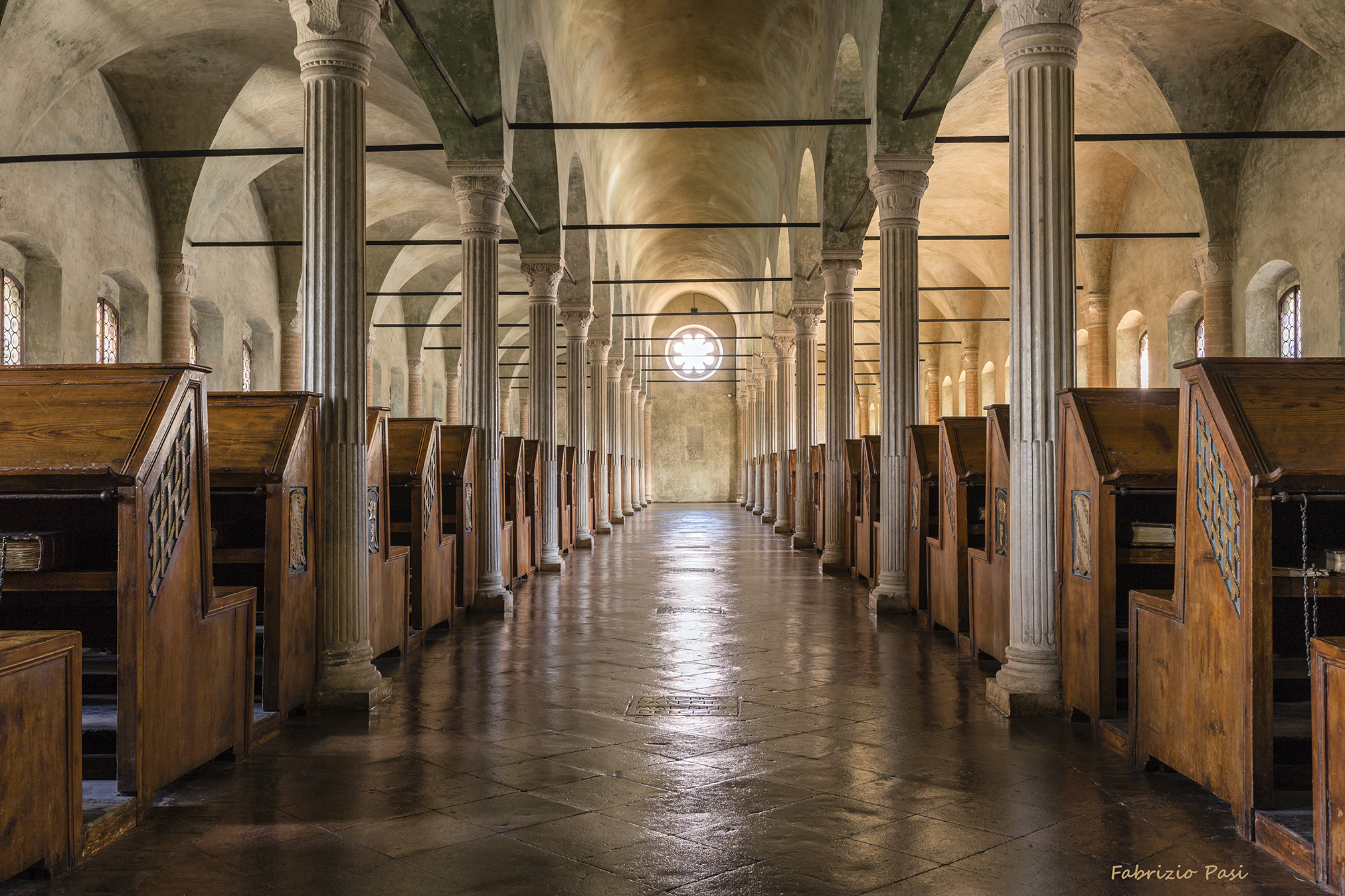 Biblioteca Malatestiana This is a photo of a monument which is part of cultural heritage of Italy.